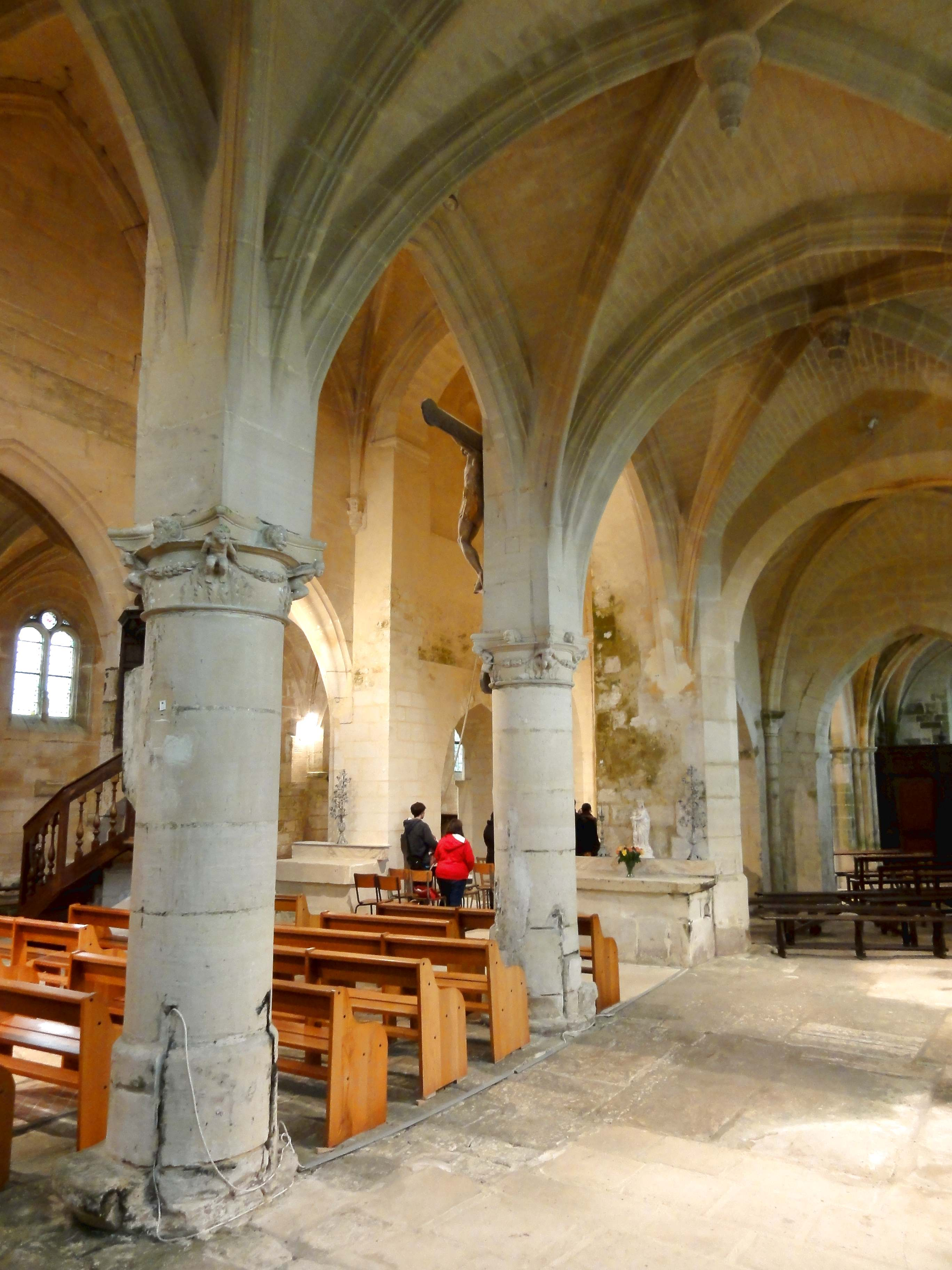 Intérieur de l'église - voir titre.